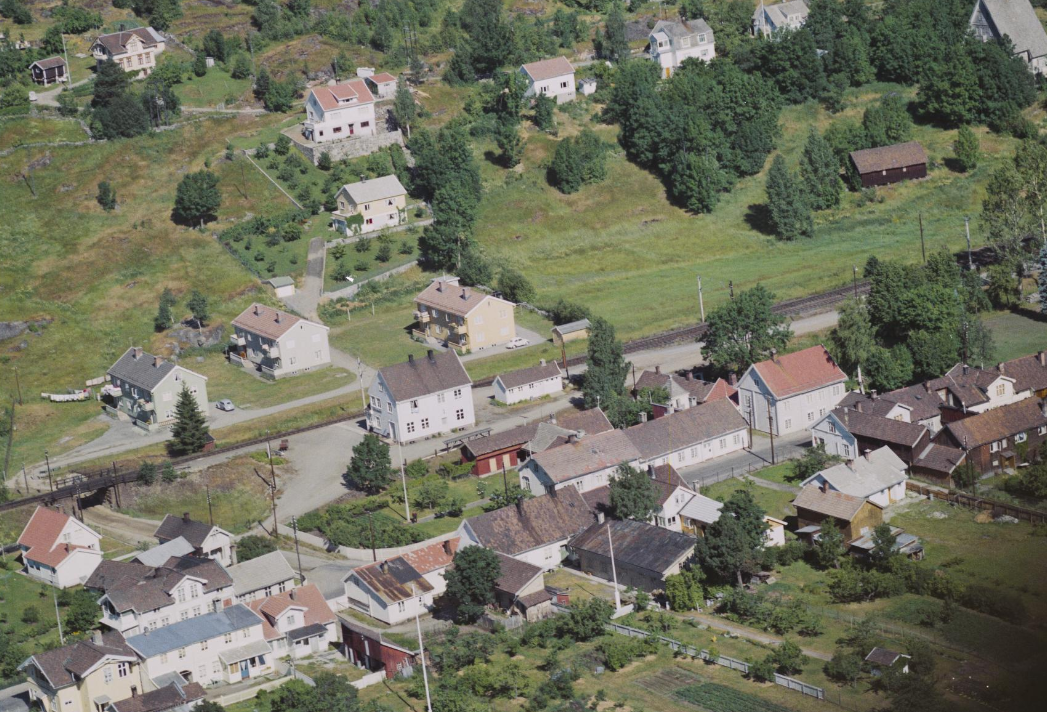 Sandsværmoen stoppested. Foto: Widerøes Flyveselskap